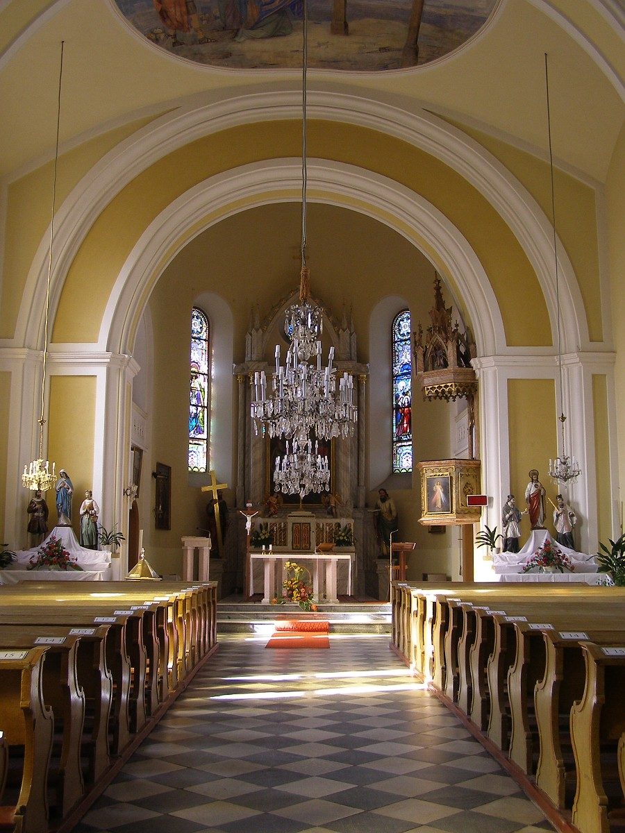 Interiér římskokatolického kostela